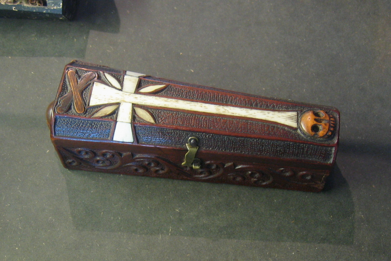 Beschlossenes Betrachtungssärglein. 18./19. Jahrhundert. Museum für Sepulkralkultur, Kassel, Deutschland.